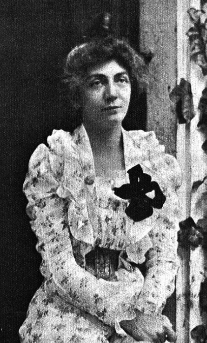 Marie-Nancy Vuille (1867–1906) alias André Gladès, Schriftstellerin.